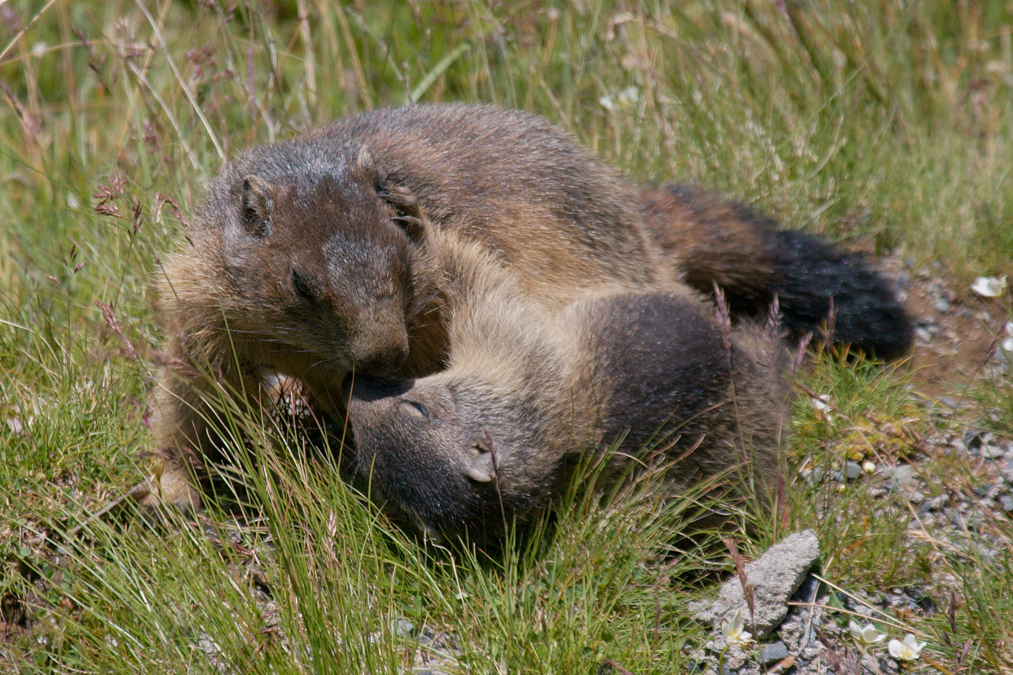 Marmota marmota at Glockner